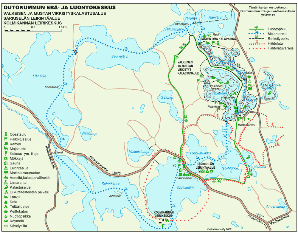 Outokummun Erä- ja luontokeskuksen kartta, jossa kuvattu reitit ja levähdyspaikat. Särkiselän leirintäalue ja Kaunisniemen kahvila sijaitsevat n. 5 km Outokummun keskustasta.